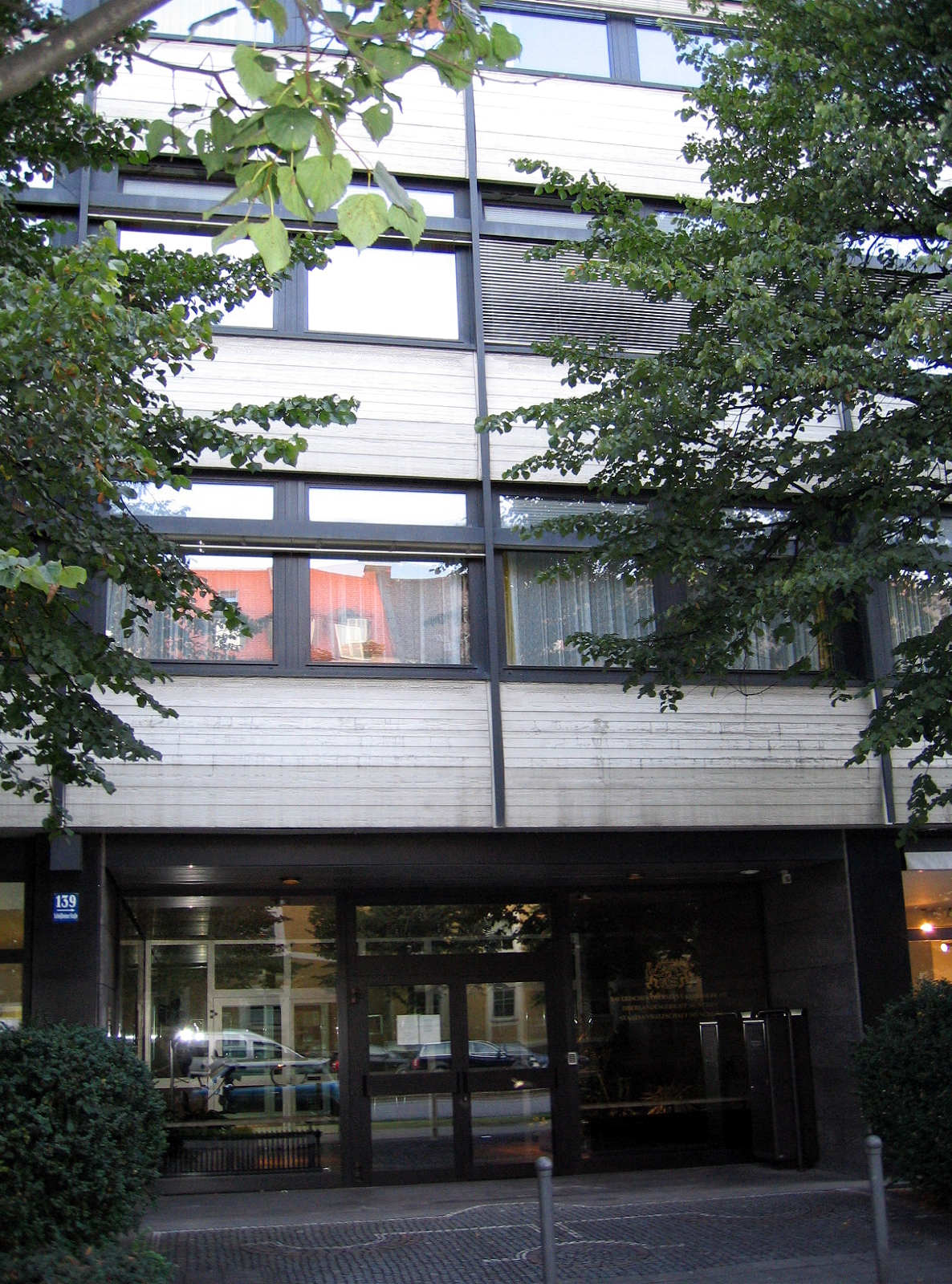 Gebäude des Bayerischen Obersten Landesgerichtes, des Oberlandesgerichtes und der Staatsanwaltschaft I, Schleißheimer Straße 139 in München